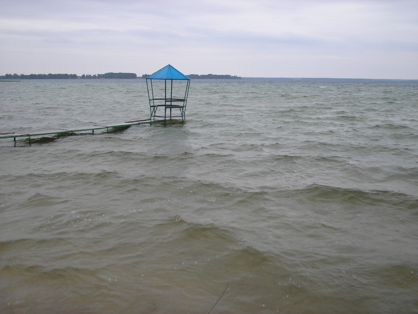 Der Switjassee im Sommer 2007 bei Schlechtwetter